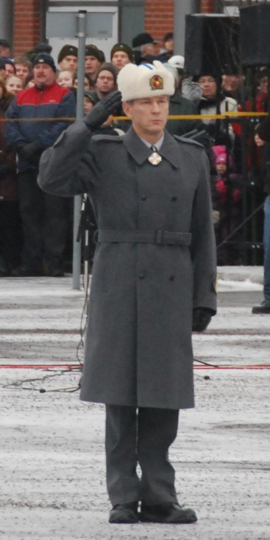 Ari Puheloinen